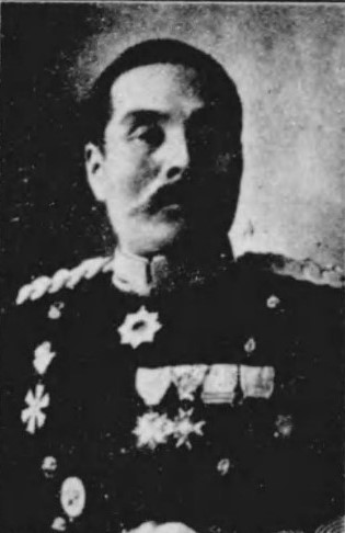 渡辺兼二（1866～1928）